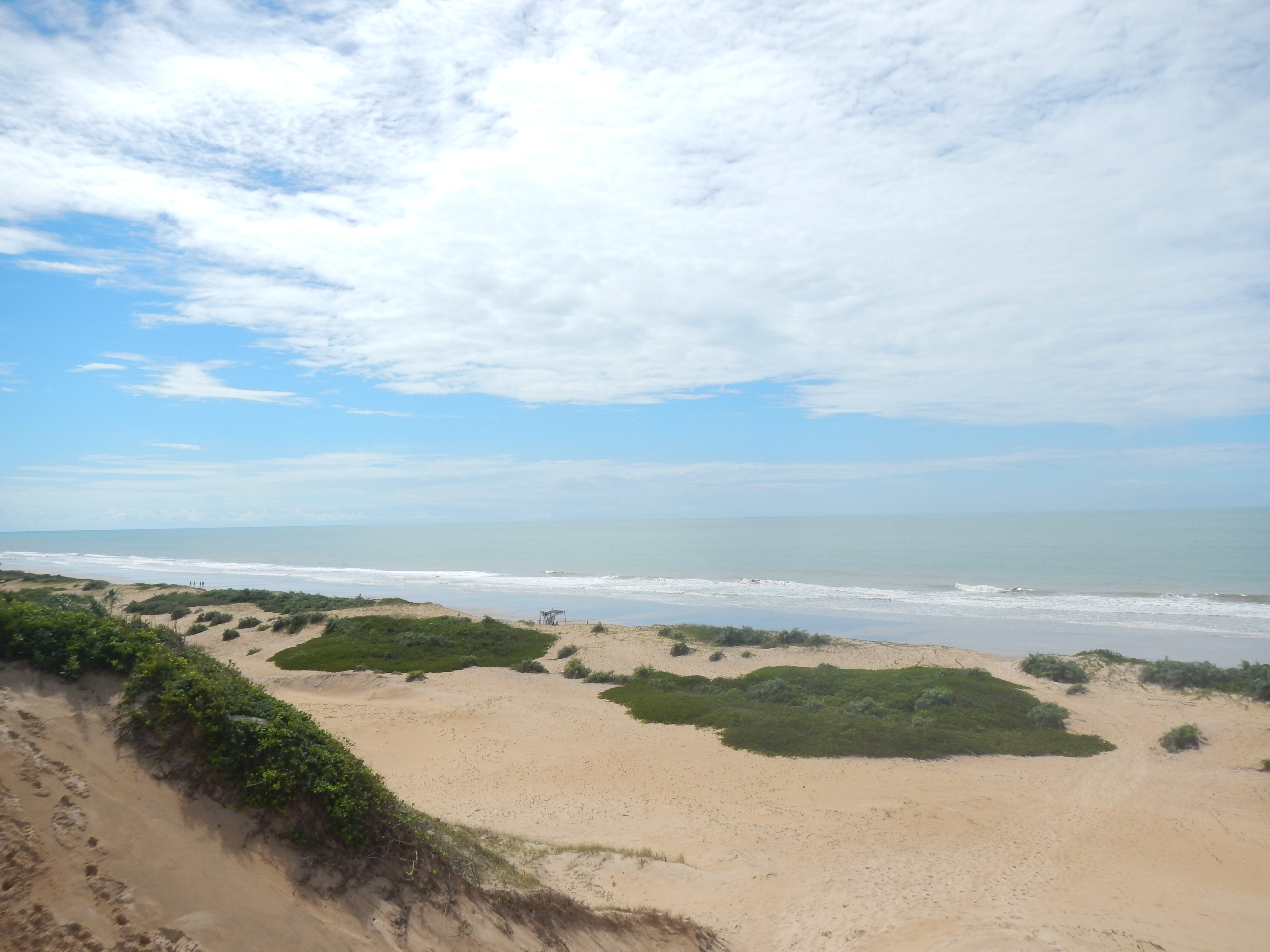 Dunas de Itaúnas, no ES, em abril de 2014.